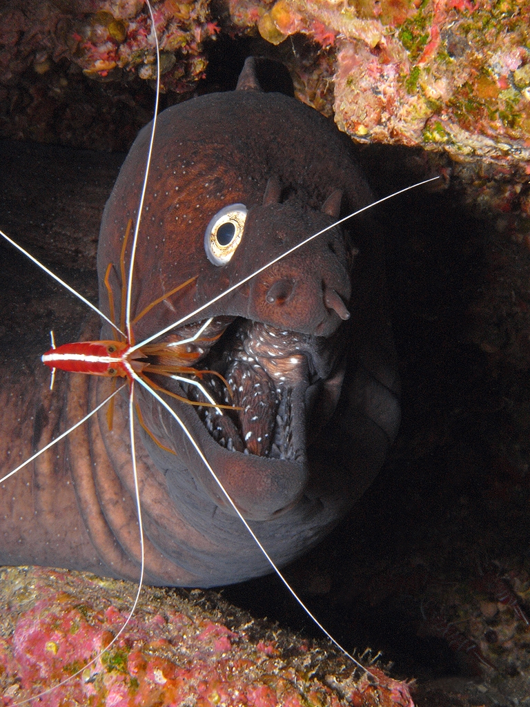 Muraena augusti - Black moray / Morena negra / Murène noire & Lysmata grabhami - White-striped cleaner shrimp / Lady escarlata / Crevette barbier (crevette nettoyeuse), el Hierro.